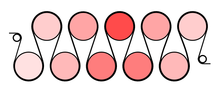 dessin perso. Libre de droit